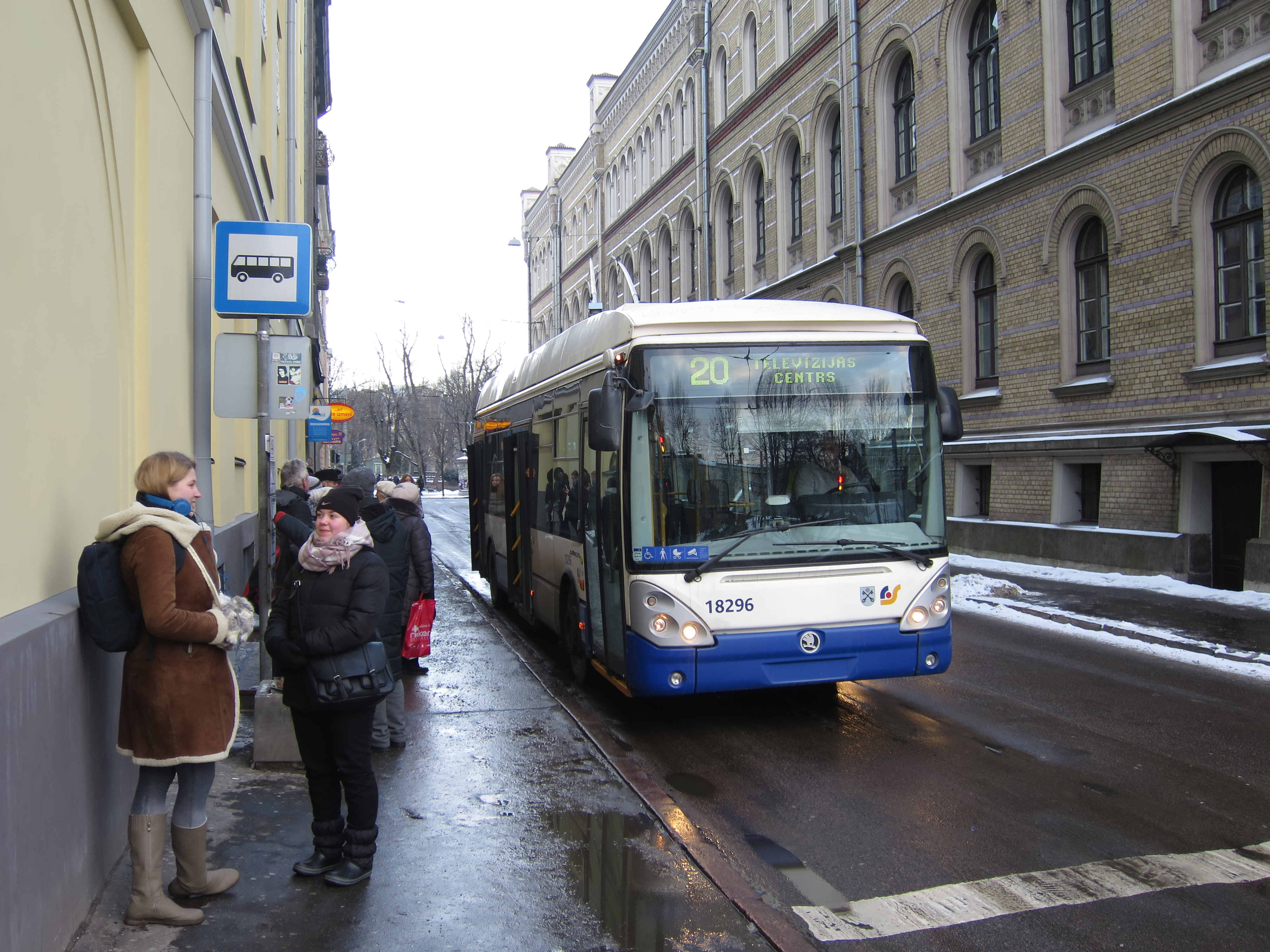 20. maršruta trolejbuss galapunktā Inženieru ielā